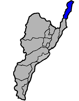 本圖係小籃子為編輯臺灣省臺東縣長濱鄉所改繪，感謝KJ提供原圖。